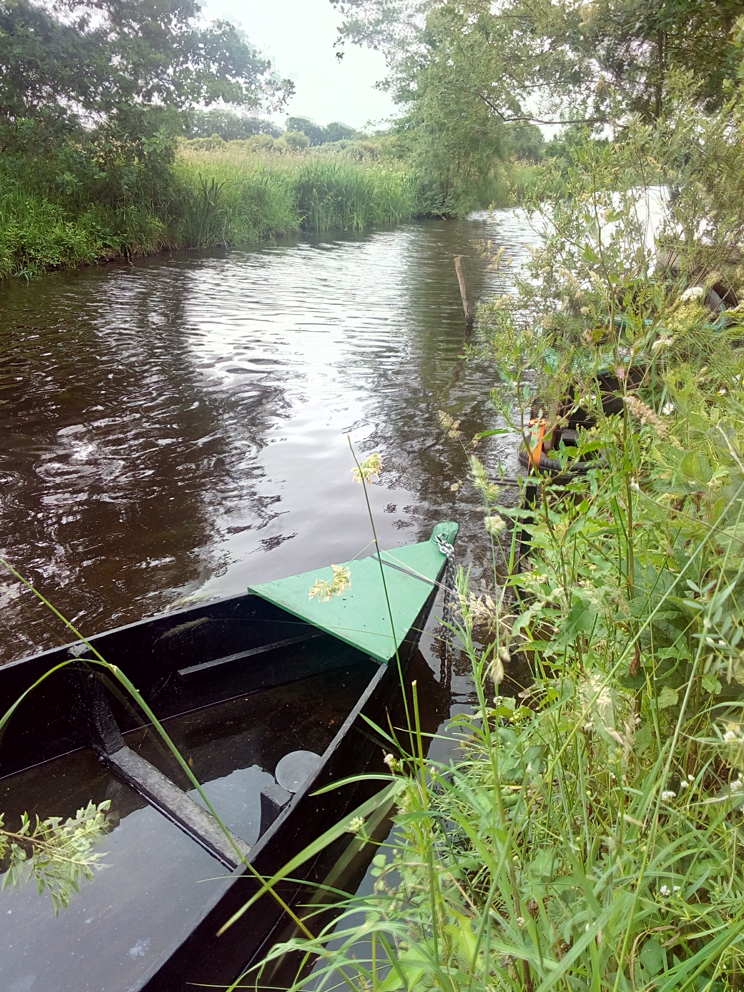 Chaland amarré sur le canal de Sainte-Reine-De-Bretagne dans le parc naturel régional de Brière au lieu nommé par les habitants "port de Sainte-Reine-De-Bretagne"